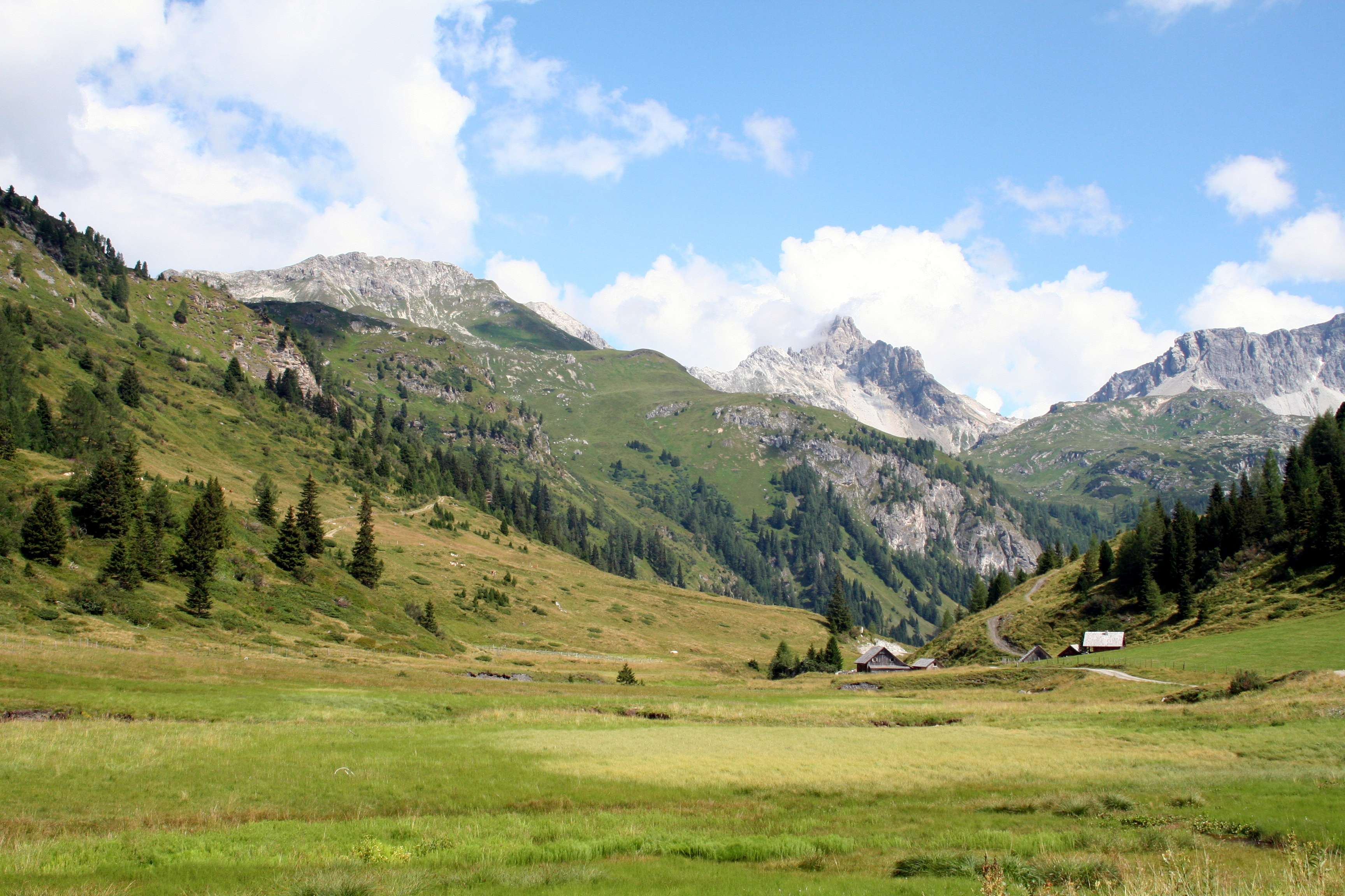 Sanfte Almenwiesen im Naturpark Riedingtal in Salzburg-Lungau. This file shows the Nature Park with the ID 5837 in Austria.